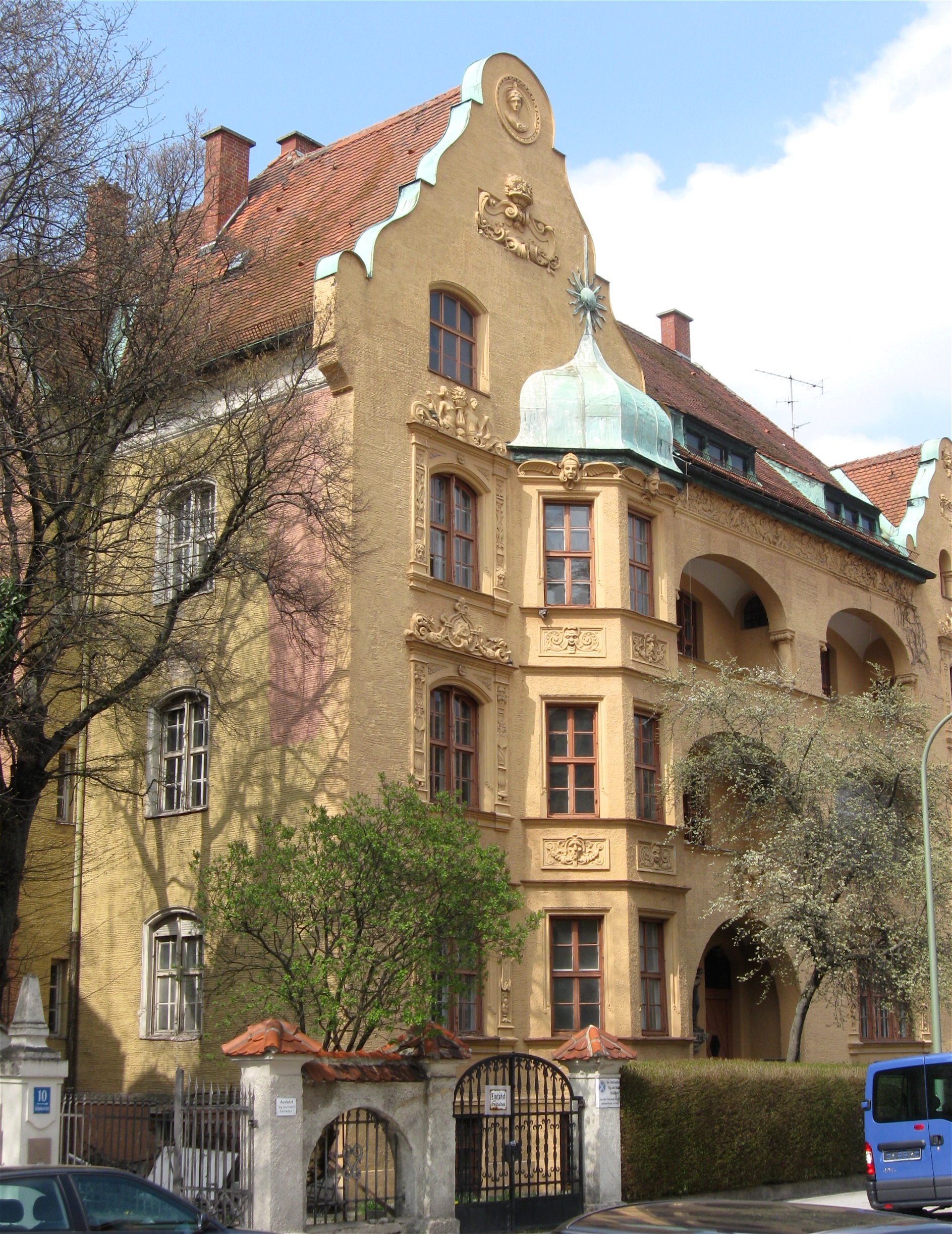 Schubertstraße 8; Malerisches Mietshaus, deutsche Renaissance, reich gegliedert und dekoriert, 1894–95 von Wilhelm Spannagel.